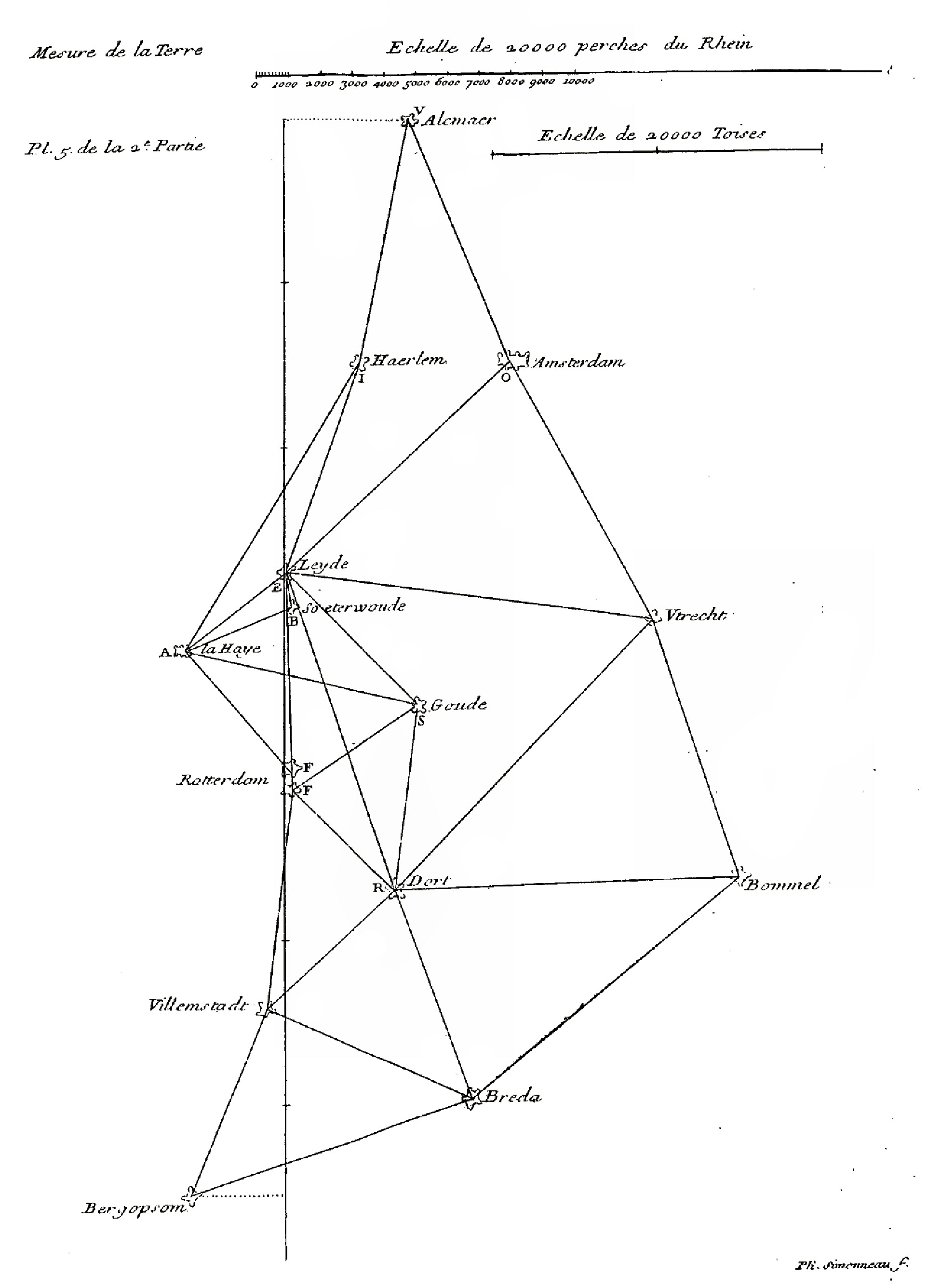 Triangulation principale de Snellius par Jacques Cassini.